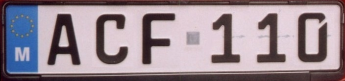 Malta EU license plate